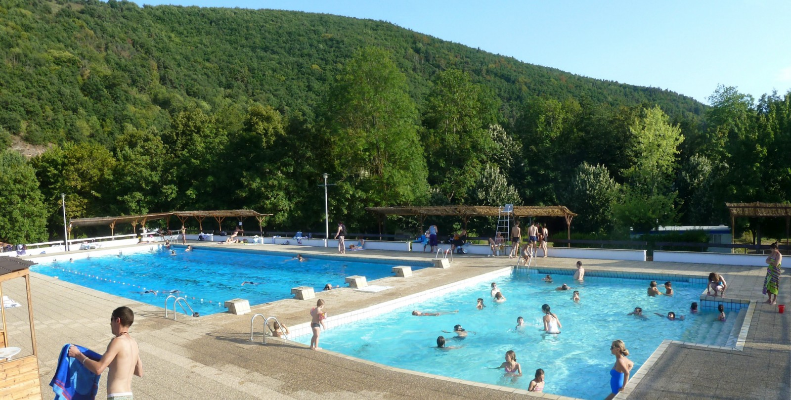 Piscine de Massiac (Cantal - France)